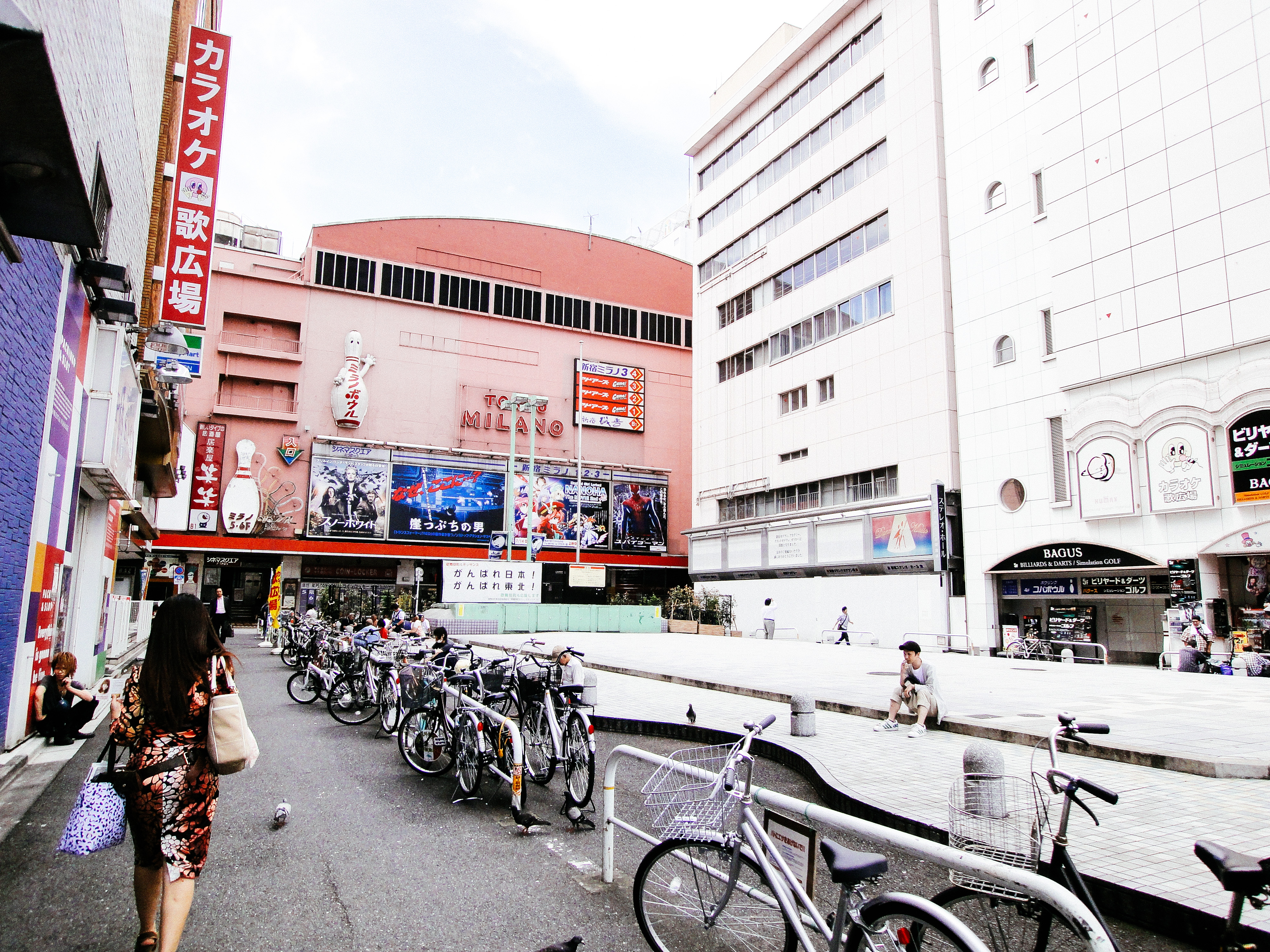 Il cinema Tokyo Milano-za di Shinjuku, Tokyo, sullo sfondo.